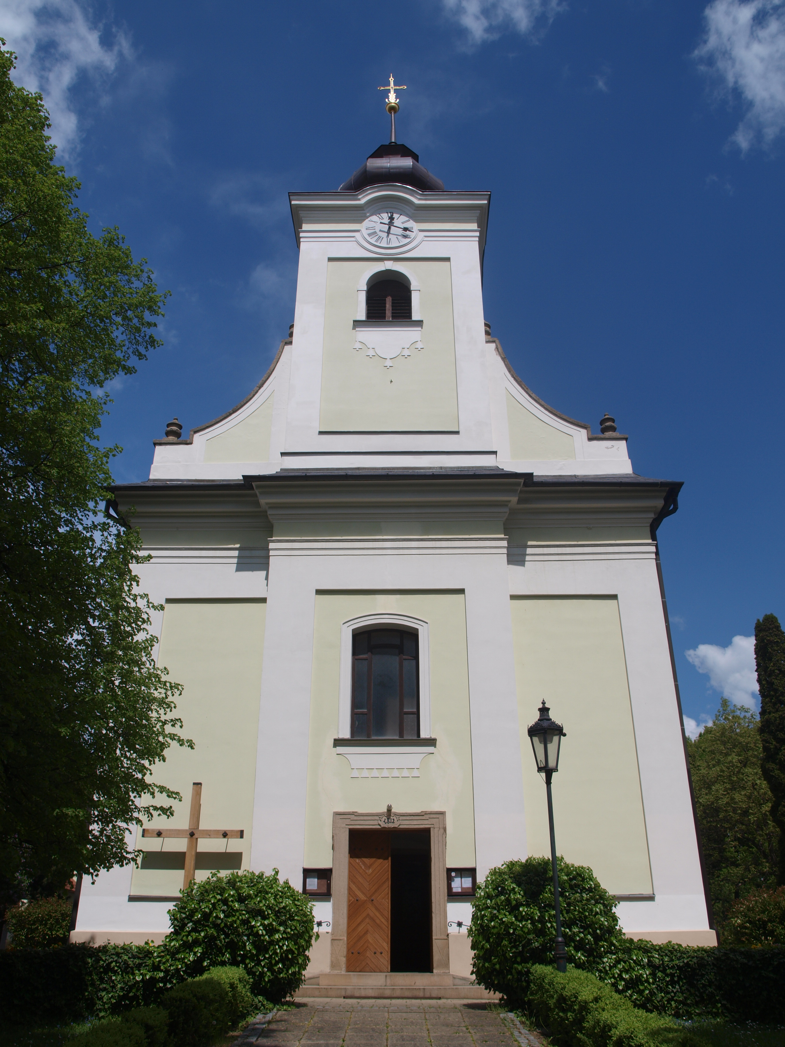 Kostel svatého Josefa v Lukově na Zlínsku